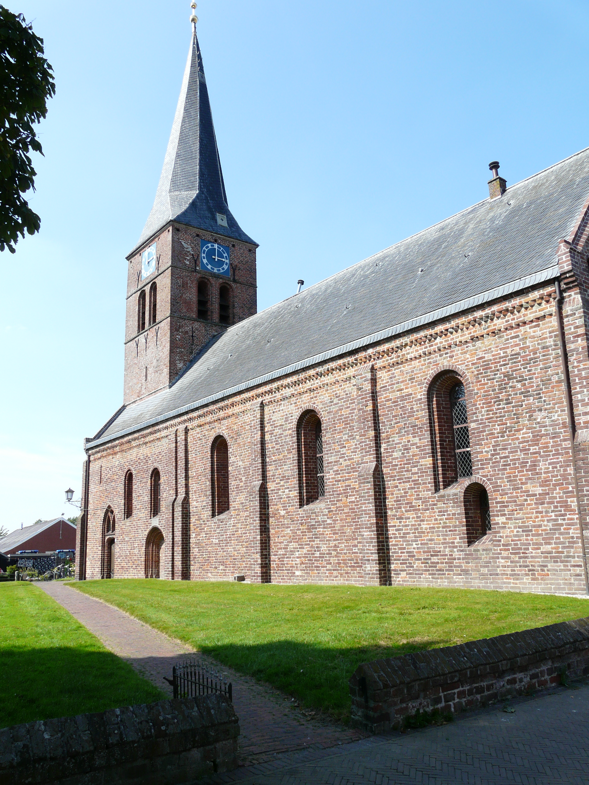 NH-tsjerke Ulrum